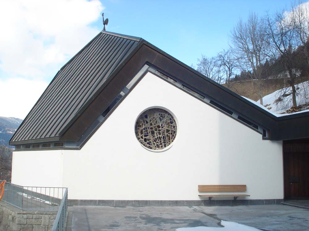 Churwalde, reformierte Kirche